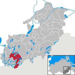 Wesenberg in Mecklenburg-Vorpommern, Landkreis Mecklenburg-Strelitz